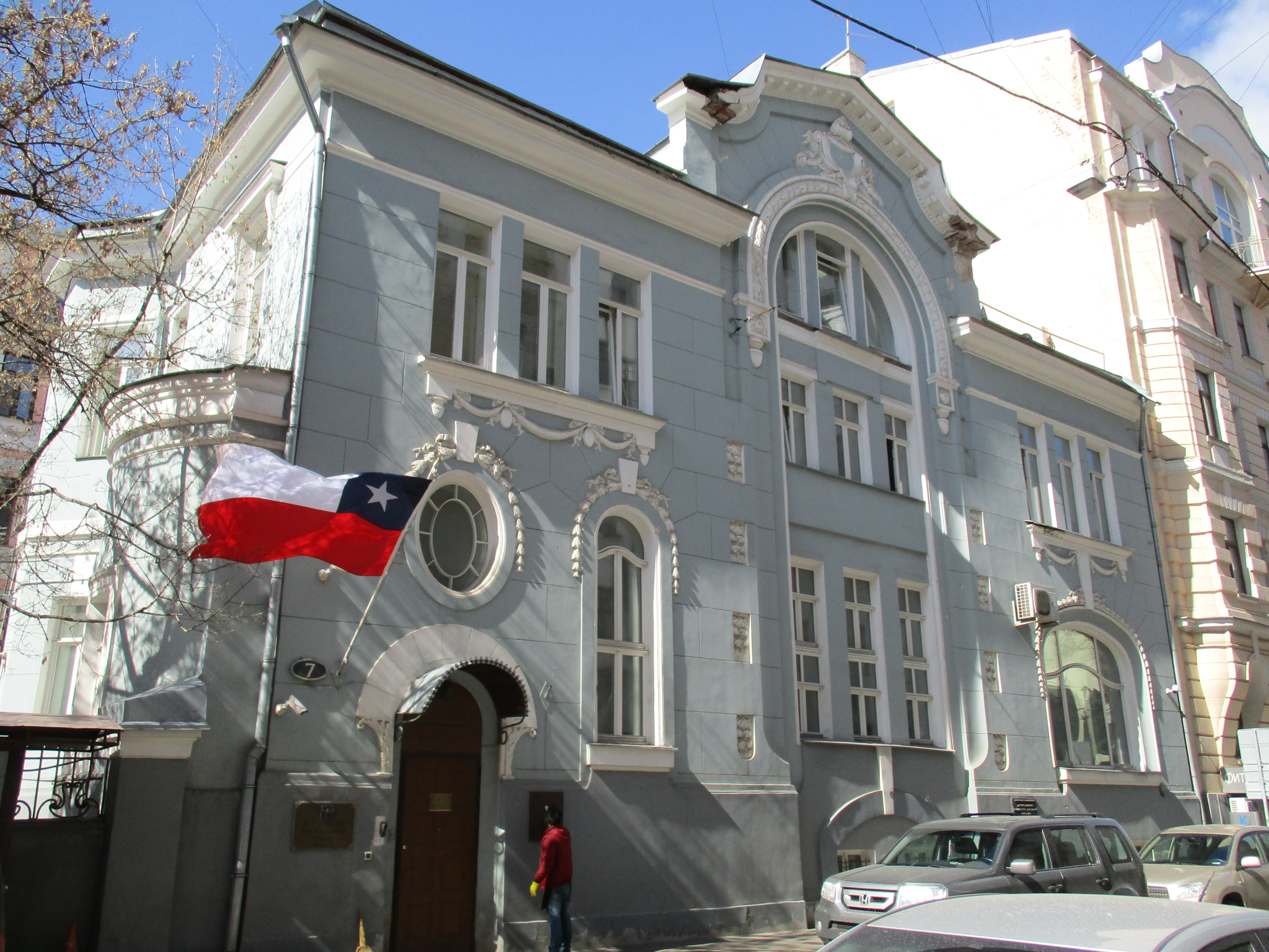 Жилой дом: Денежный пер., дом 7, строение 1, Хамовники, Центральный округ, Москва